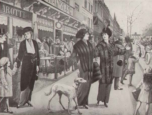 Die Pelzmoden im Berliner Leben. Michelet & Co., Berlin 1913. Kranzler Ecke. Aus einem Katalog, 10 Blätter mit 58 abgebildeten Modellen und 1 Preisliste. Quer-4°, 40 x 30 cm. Die Modelle lustwandeln in verschiedenen Etablissements, Parks etc. wie z. B. Flugplatz, Eisenbahn, Grunewald, Opernhaus.